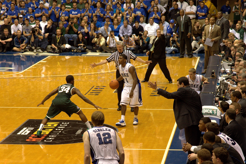 duke game